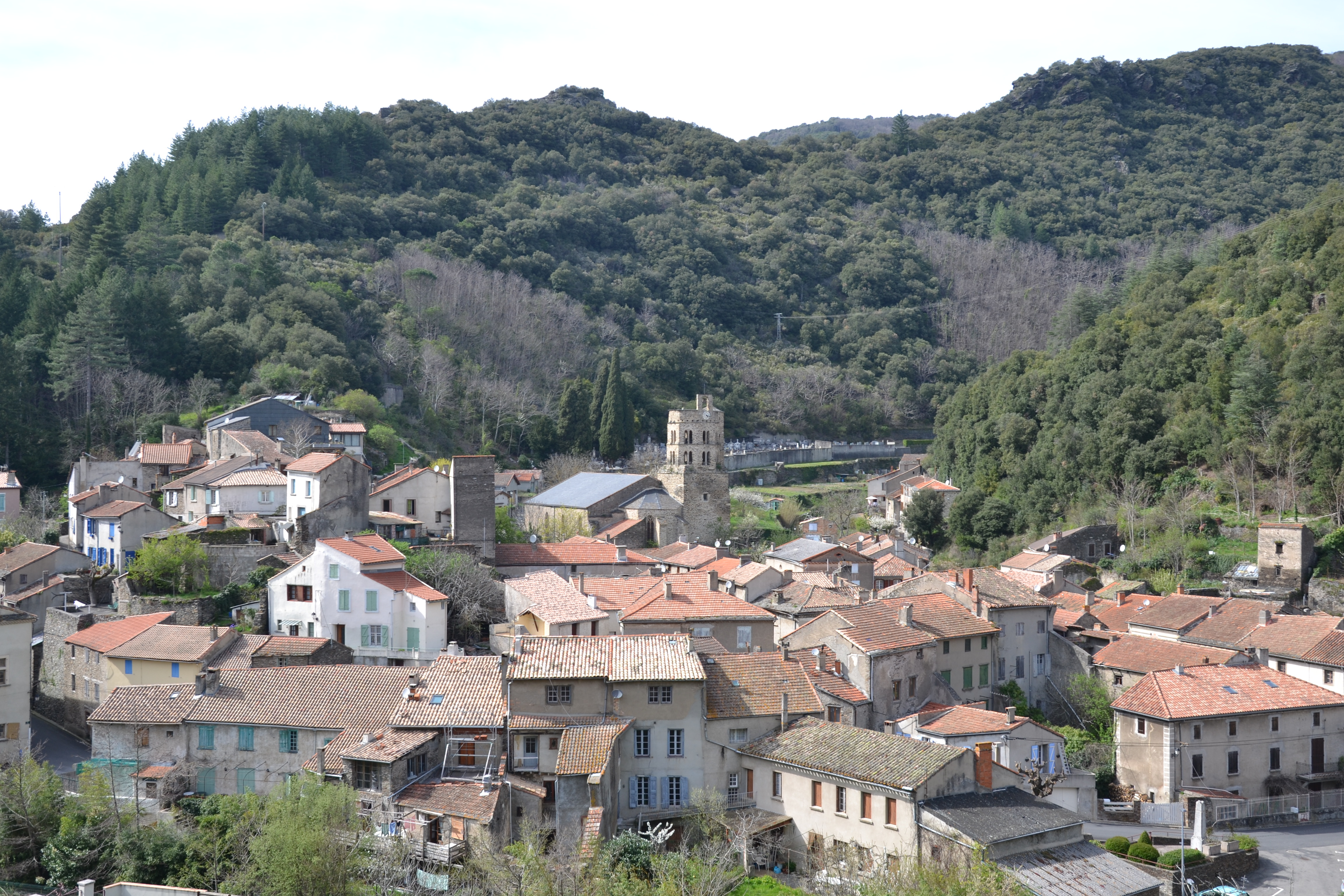 Vue générale du village depuis le calvaire